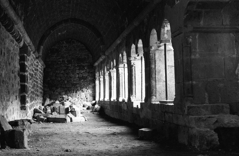 L'intérieur de l'ancien cloitre de l'abbaye de Mazan en Ardèche